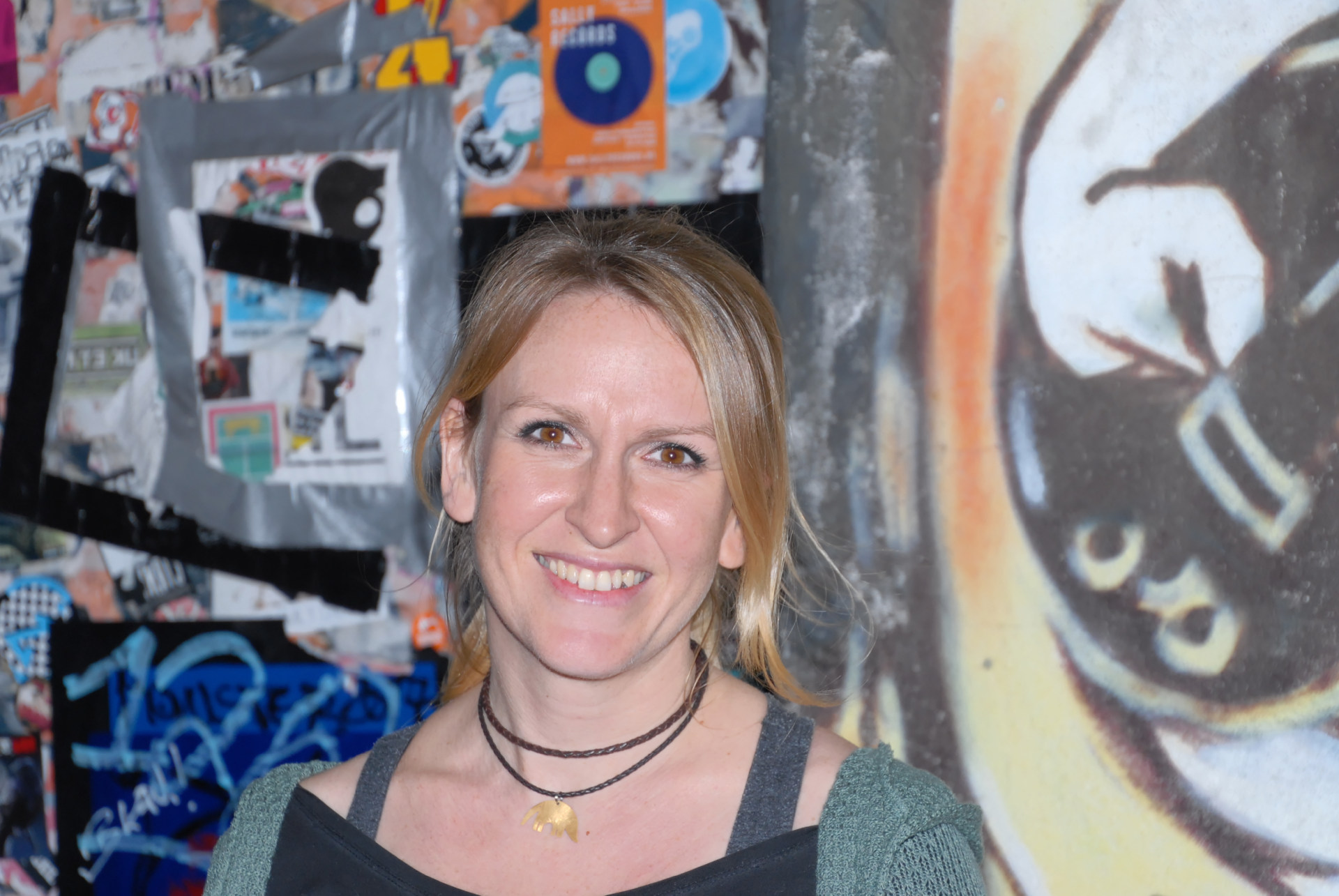 Lydia Möcklinghoff vor dem Sonic Ballroom in Köln